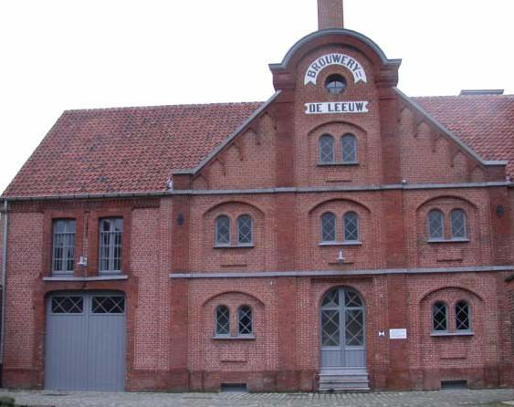 Brouwerij De Leeuw, voormalige brouwerij te Aartrijke (Zedelgem) in België.